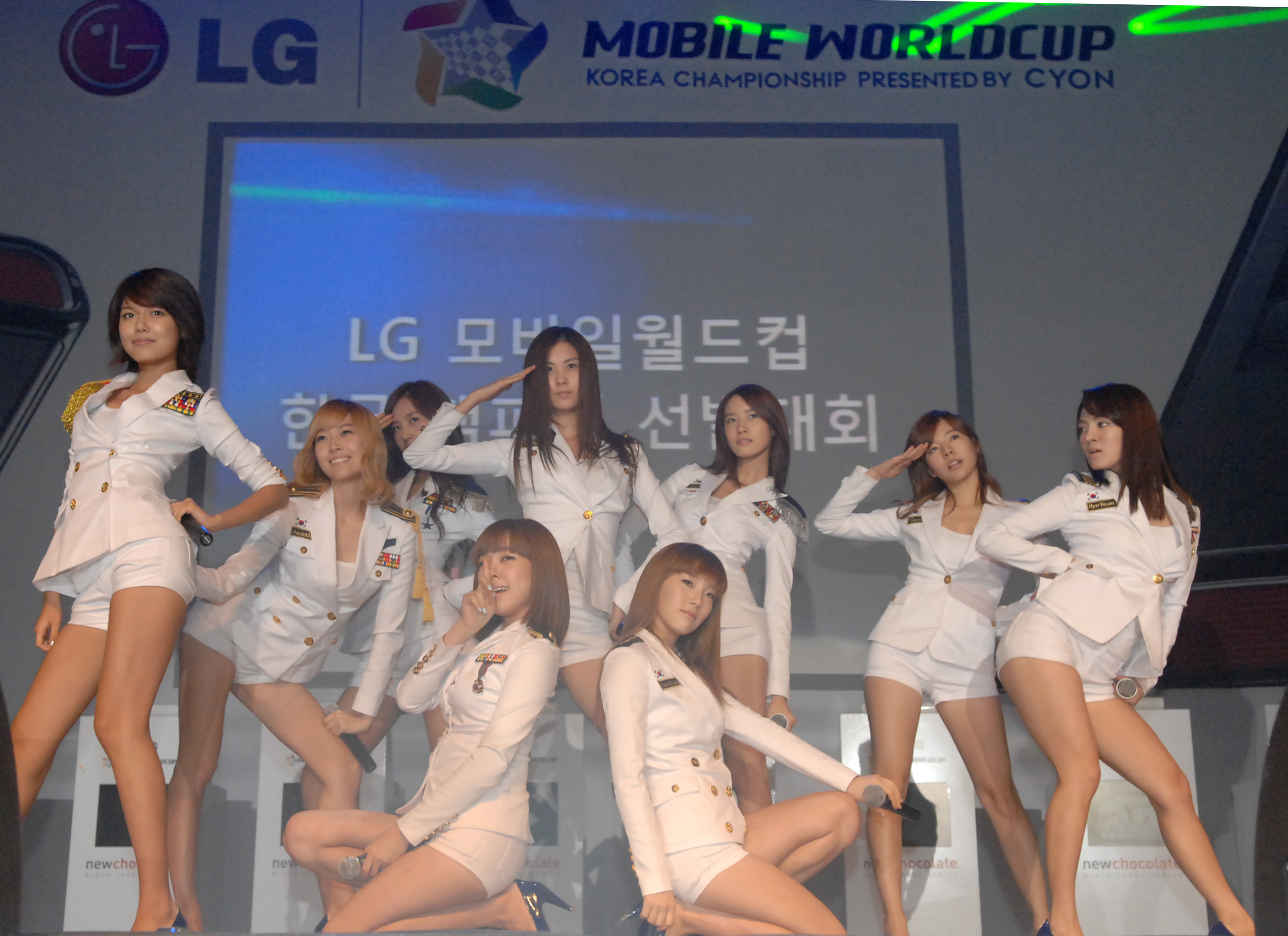 Girls' Generation perfoming "Genie" in LG Mobile Worldcup